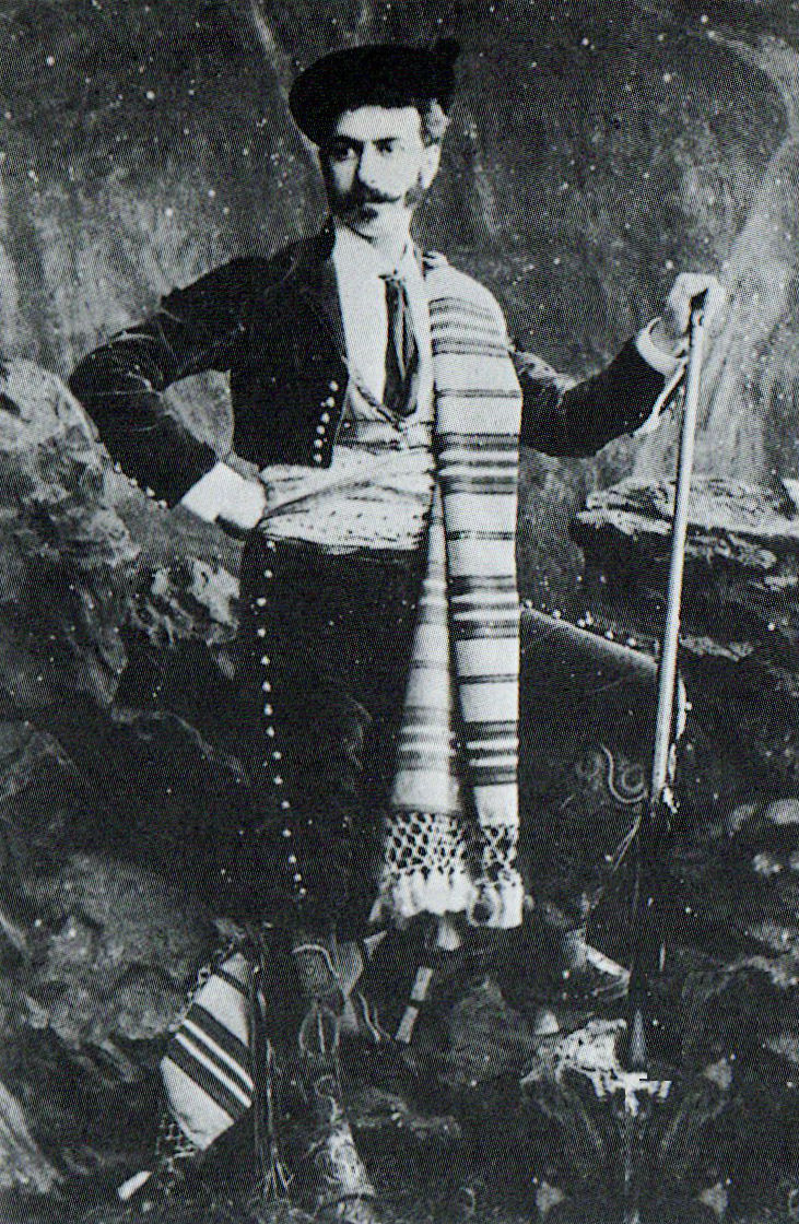 Tenor español. Écija (Sevilla) 1856 - San Petersburgo (Rusia) 1914